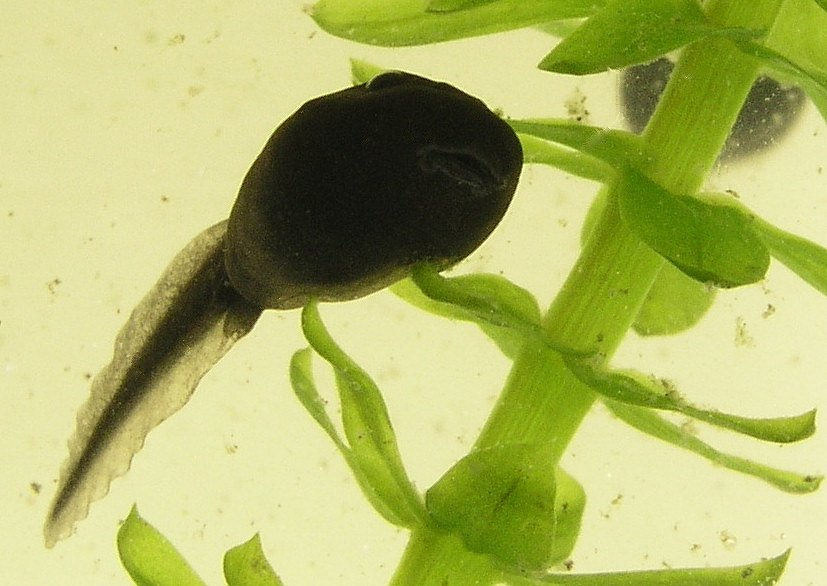 Eigen foto E v Herk 24/4/2005 vrij onder GNU FDL paddenlarve, ca 2 dgn na uit het ei komen.